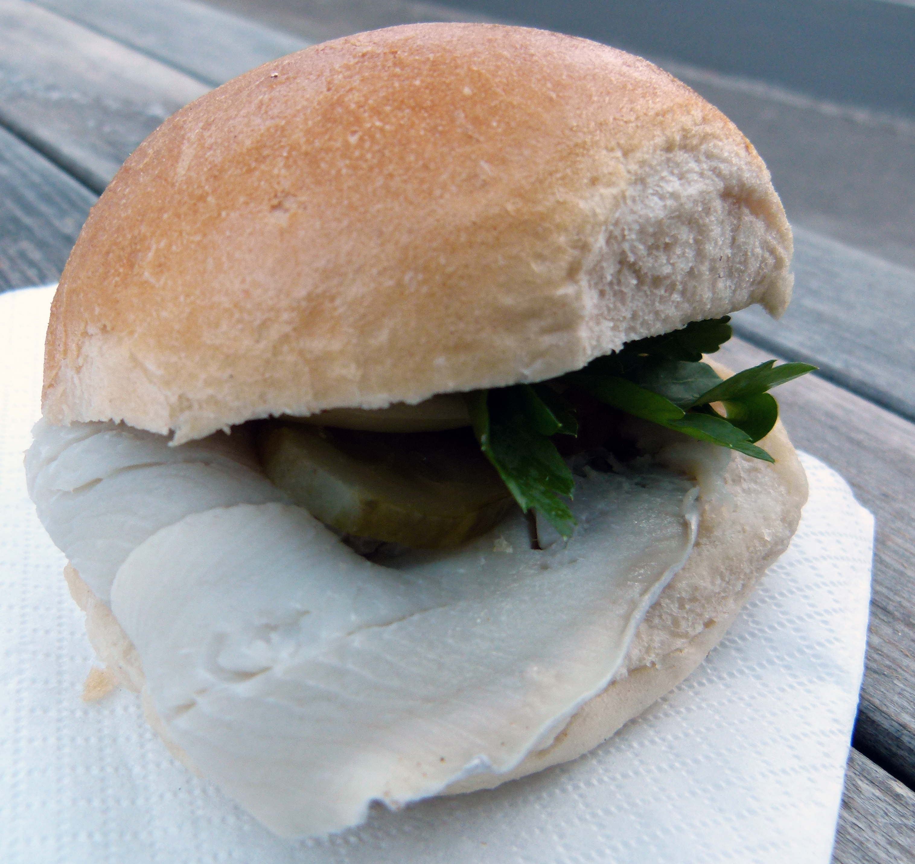 Bismarckhering im Bröttchen